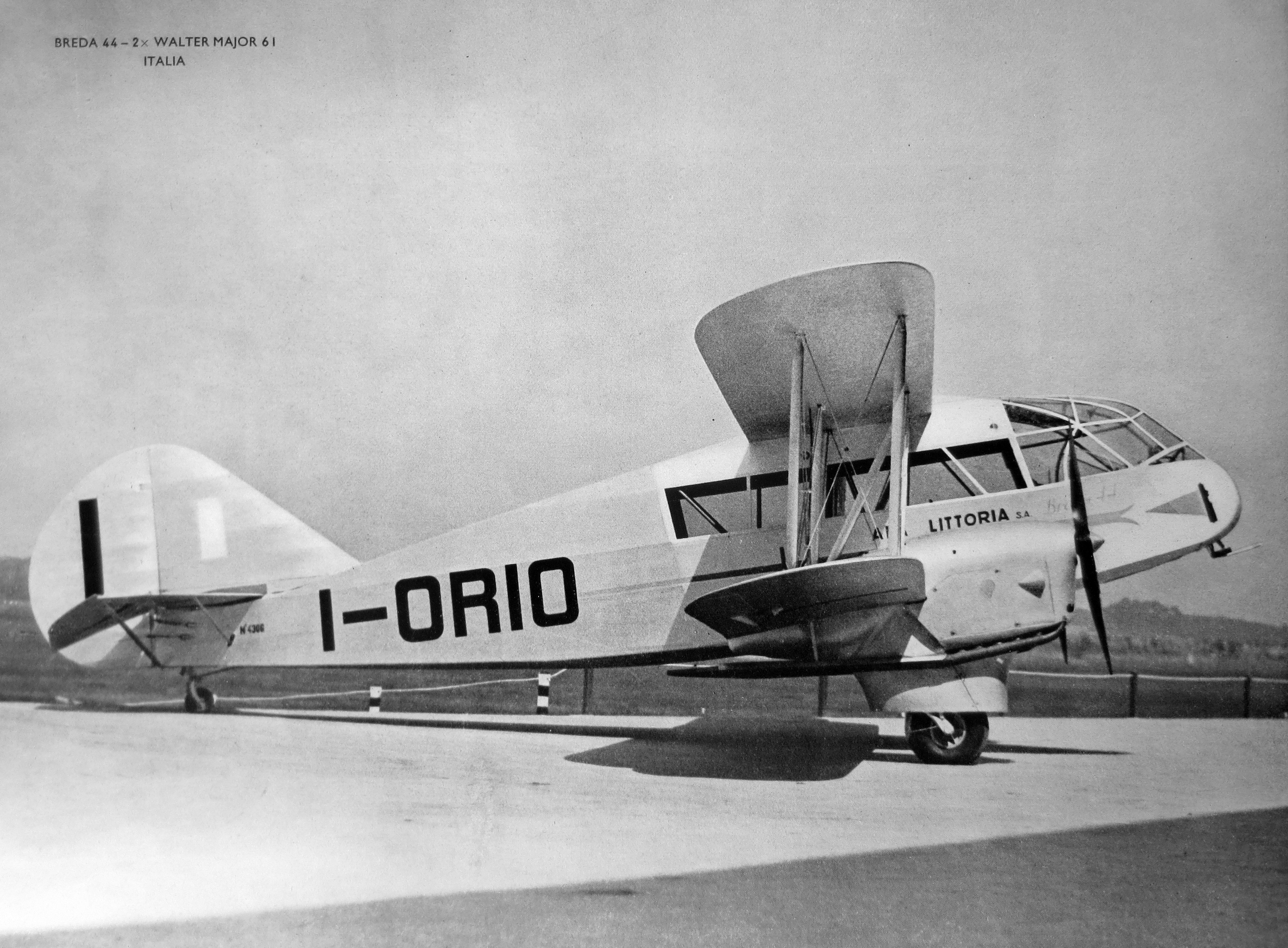 letecký motor Walter Major 6 a letoun Breda Ba.44